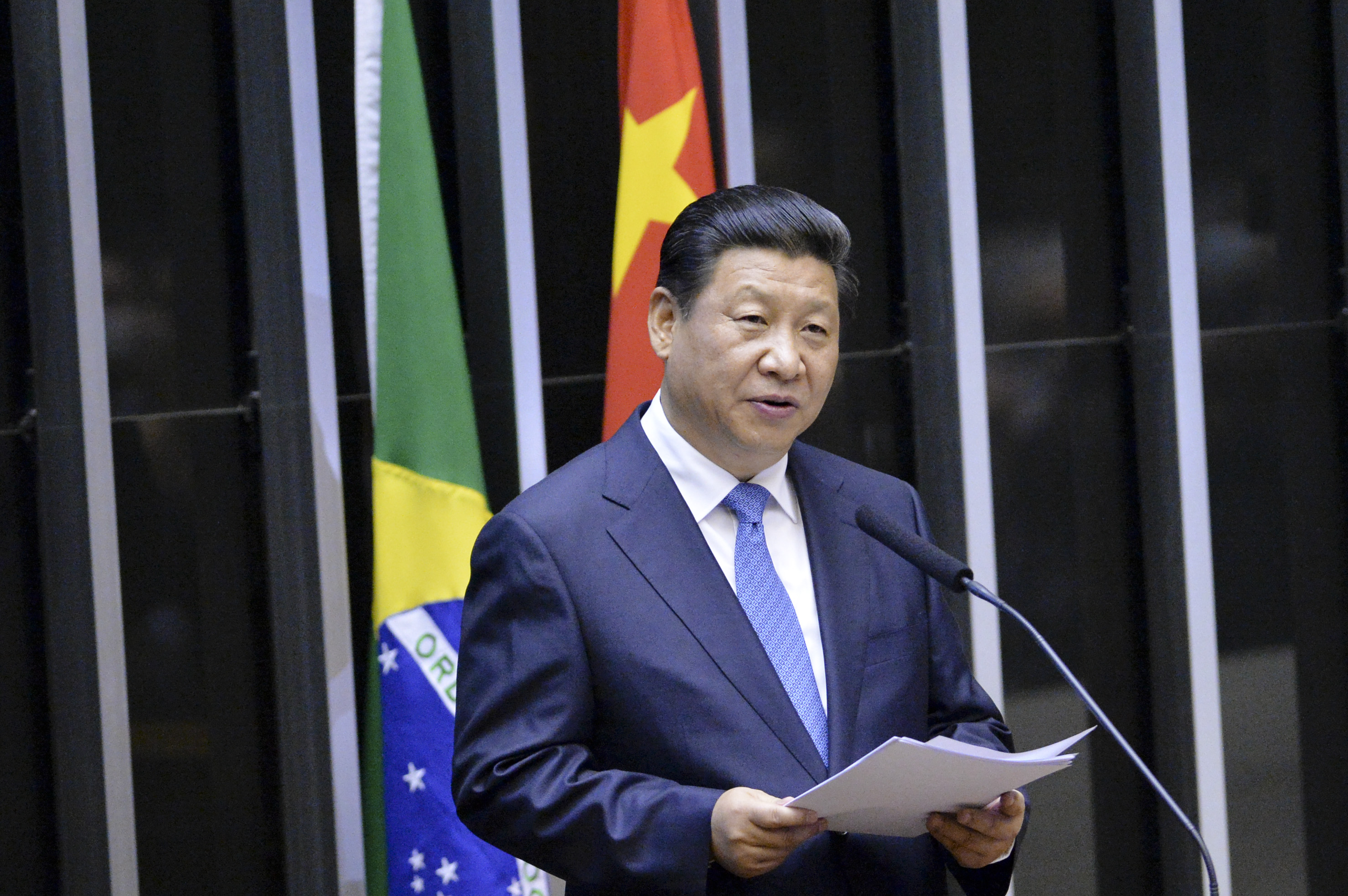 Durante discurso em sessão solene, o presidente da República Popular da China, XI Jiping, afirma que a promoção da multipolaridade e a democratização das relações internacionais devem estar no centro da agenda global foto: Edilson Rodrigues/Agência Senado